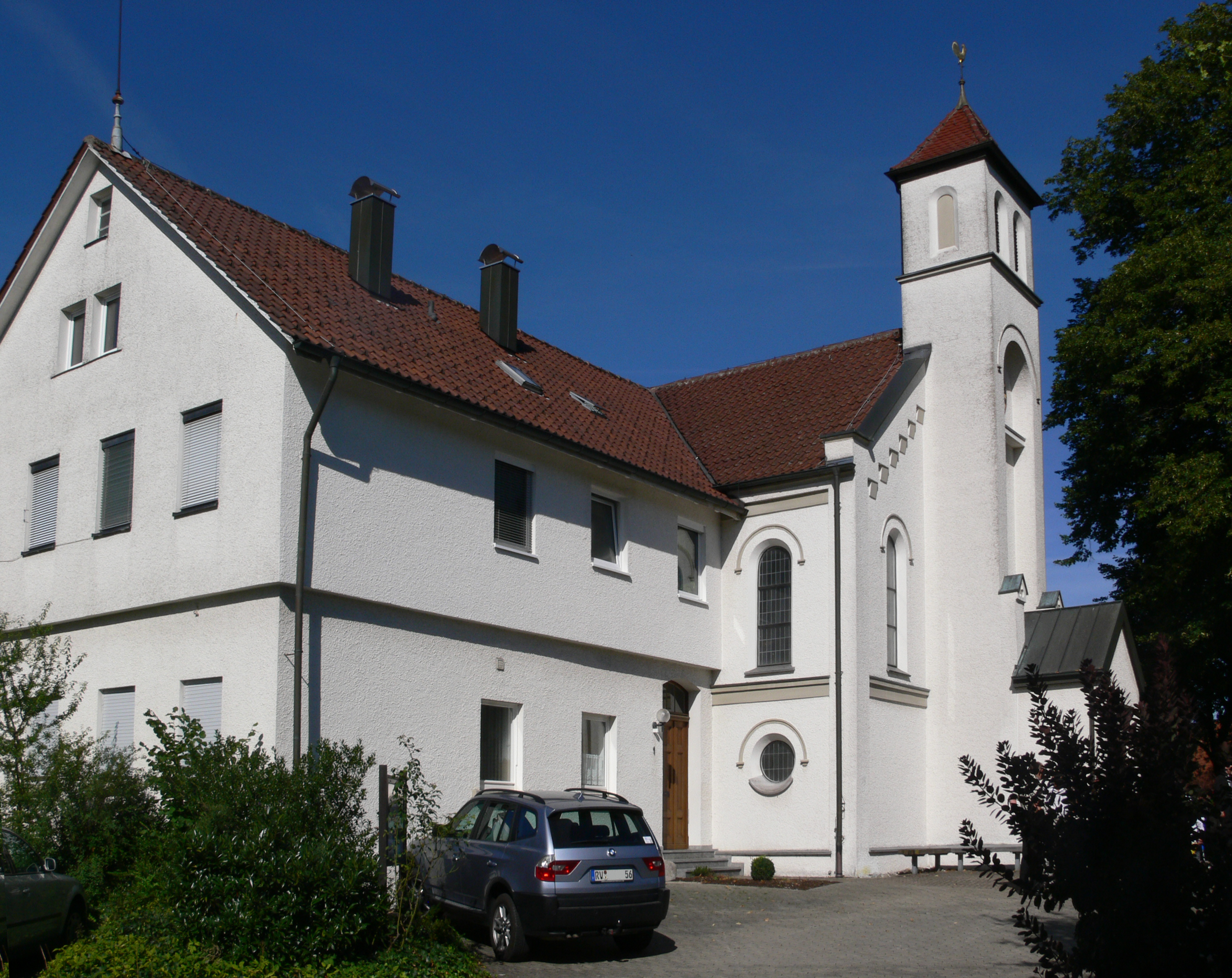 Evangelische Kirche Atzenweiler, Grünkraut, Landkreis Ravensburg